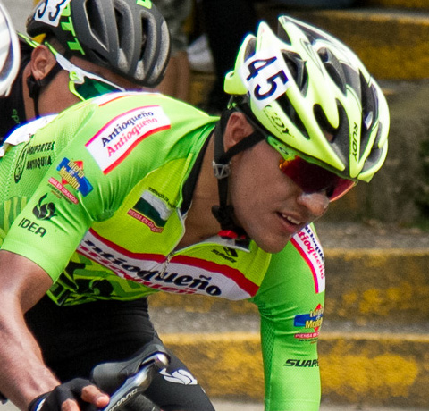 Alejandro Serna Campeonato Nacional de Ruta 2018 Medellín, febrero 4 de 2018.